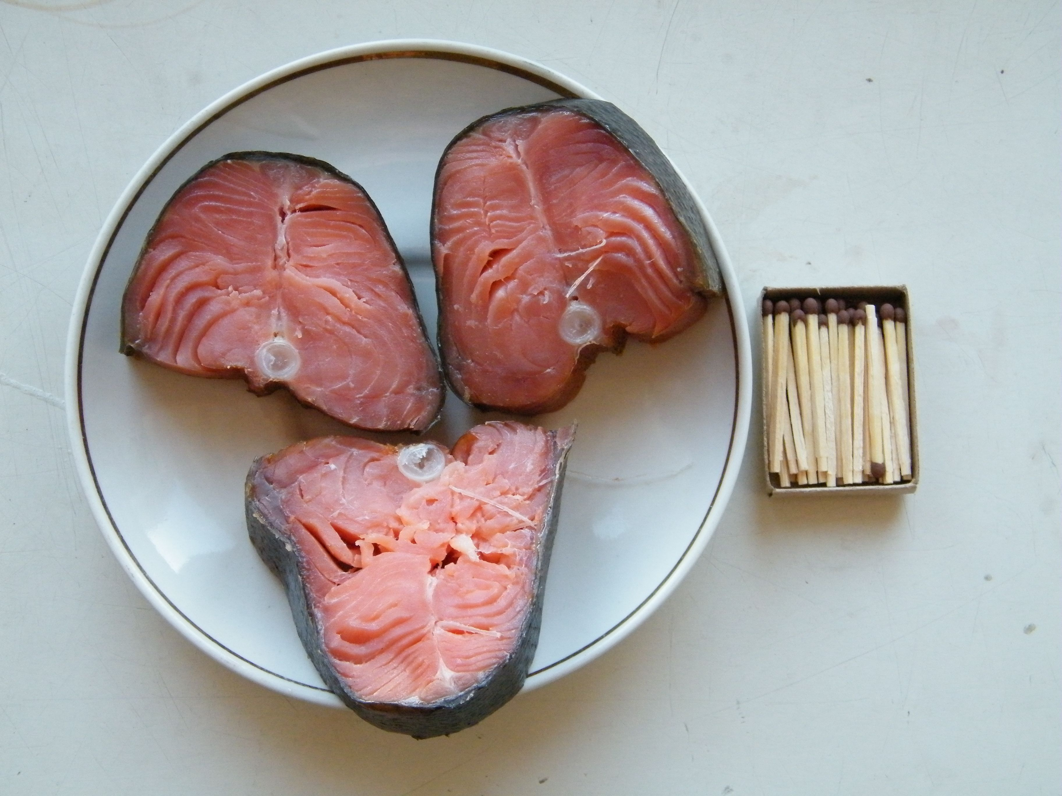 Балык из кеты